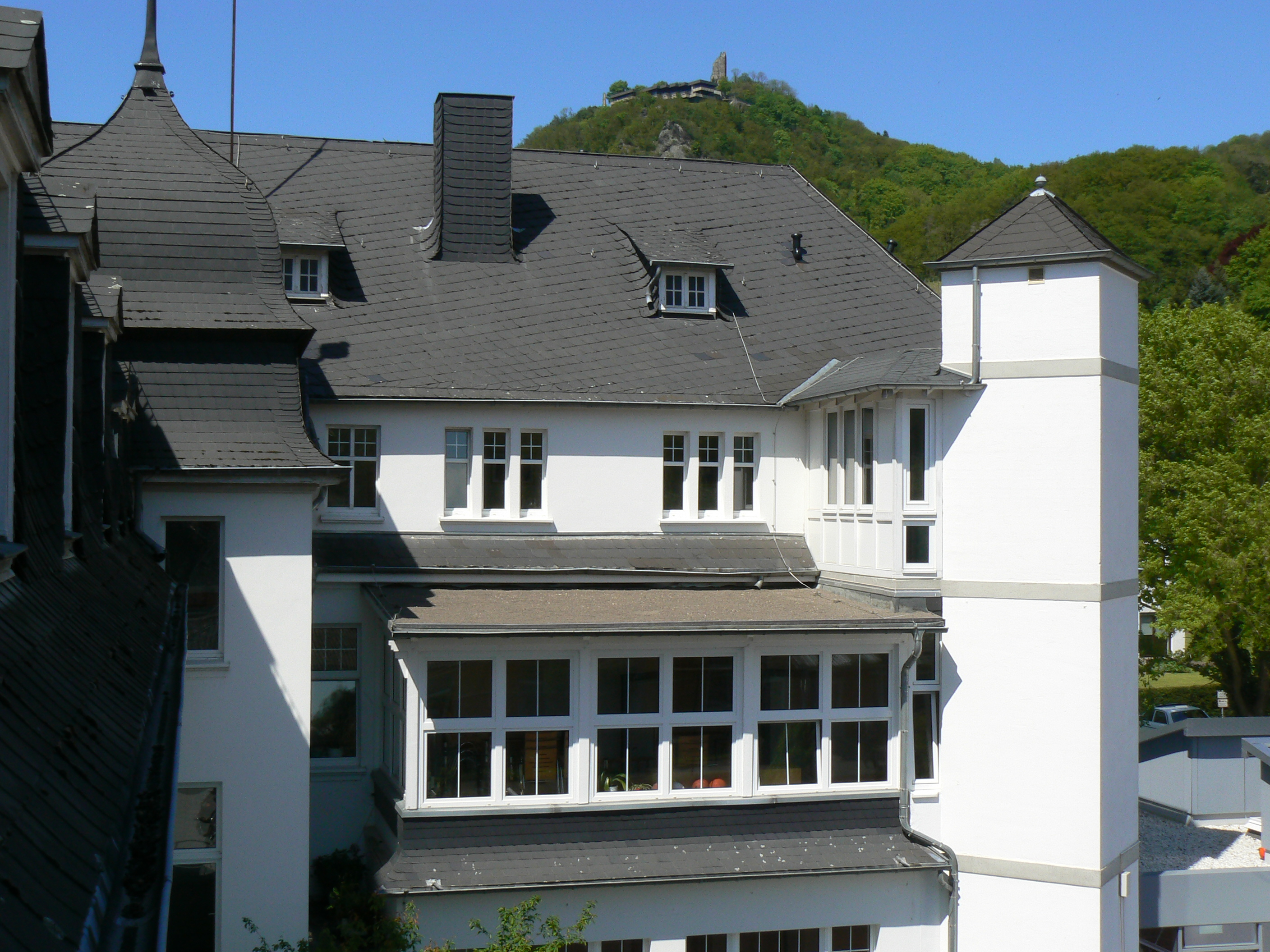 Ansicht des Haus Rheinfrieden